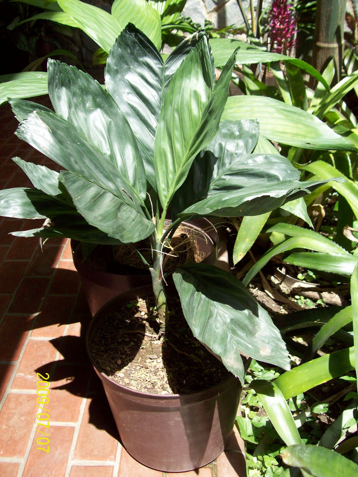 Chamaedorea metallica en Jardín botánico de Caracas